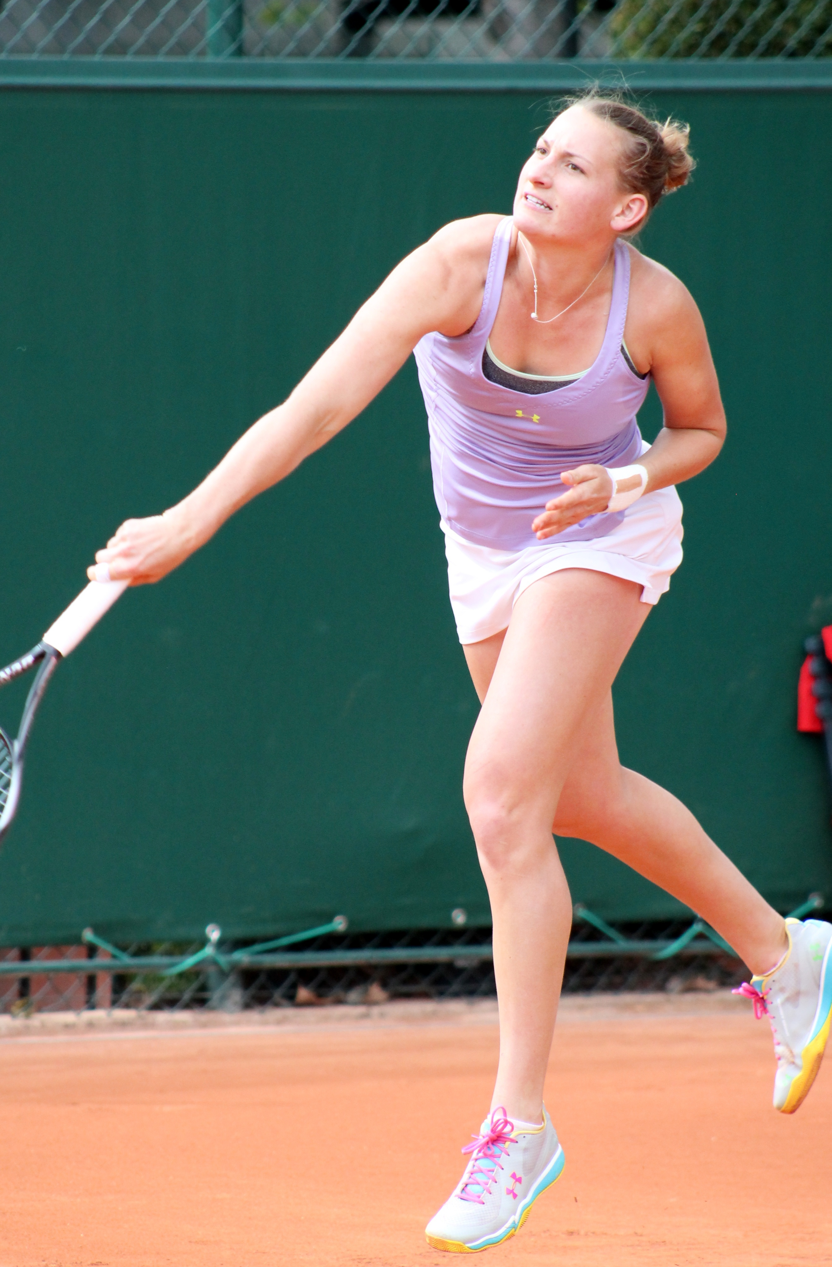 Mallory Burdette